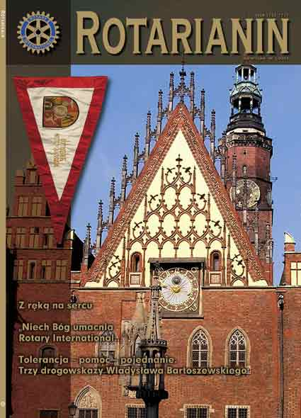 Okładka pierwszego wydania "Rotarianina"